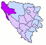 BosniaCanton UnaSana